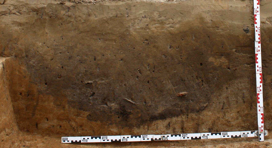 Siedlungsgrube auf dem Urnengräberfeld Hohnhorst